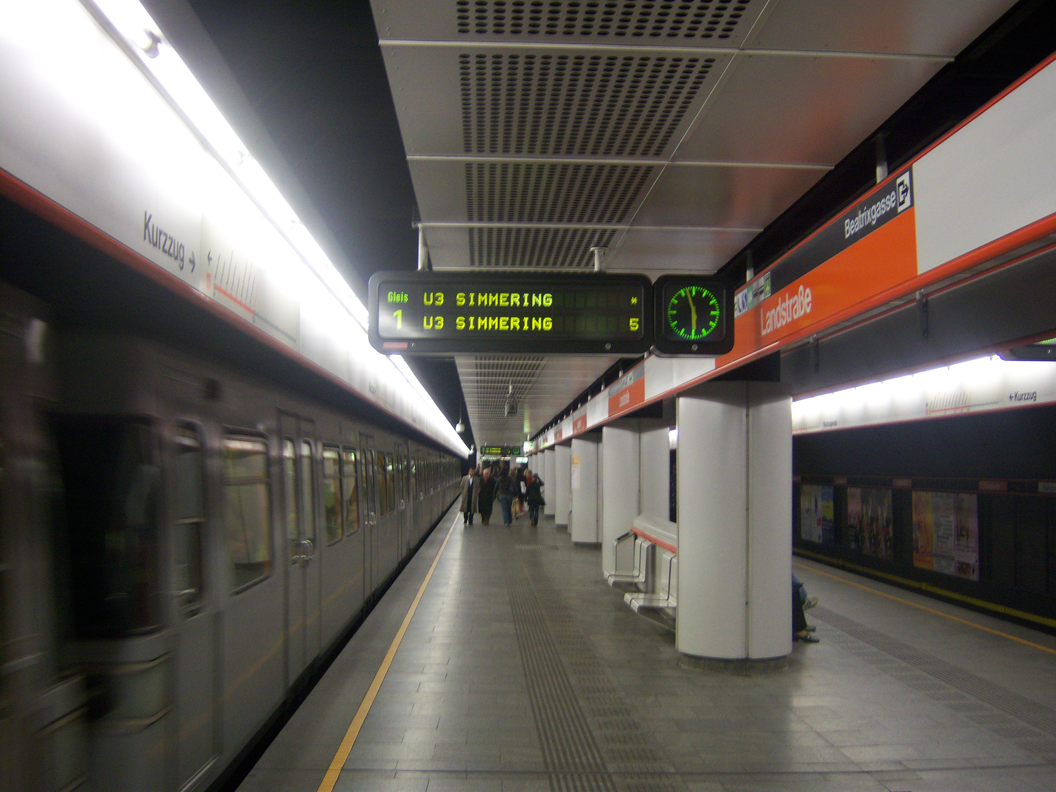 U3-Station Landstraße